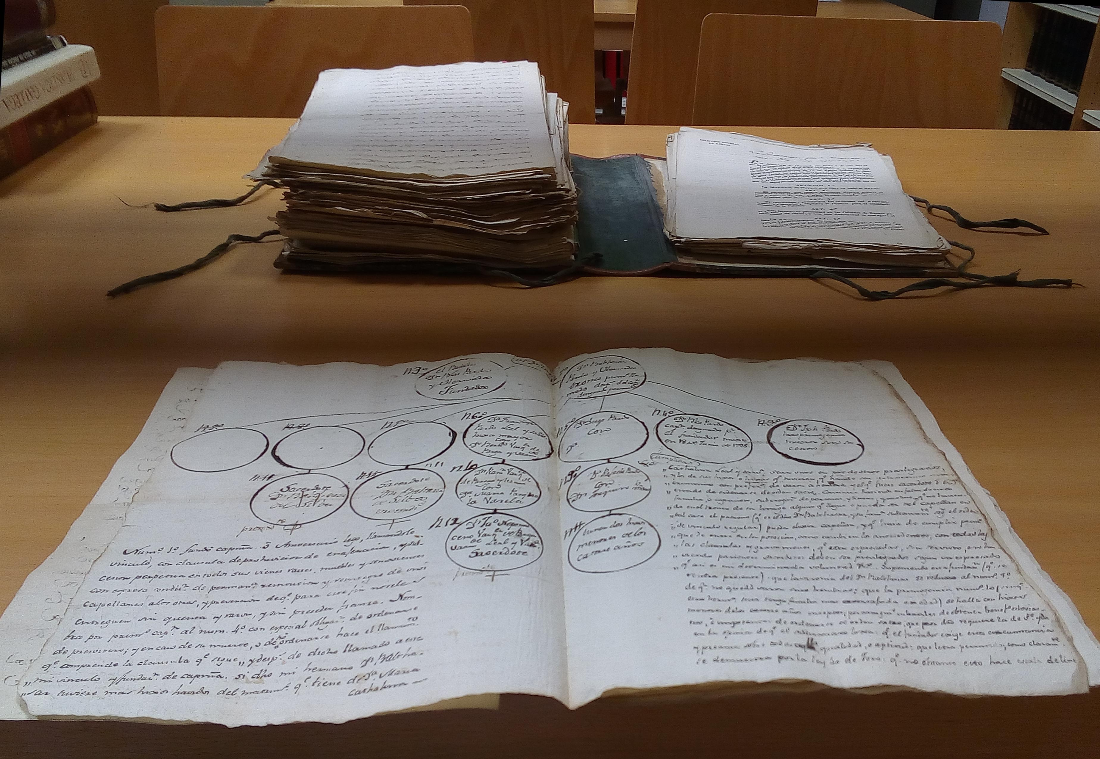 Archivo del Museo Provincial de Lugo